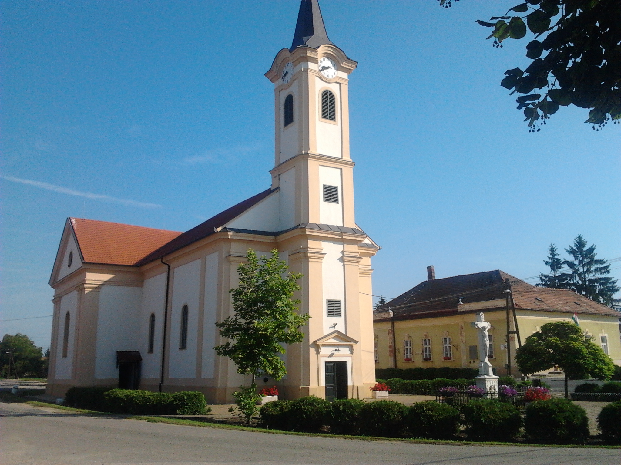 A katolikus templom Farádon.